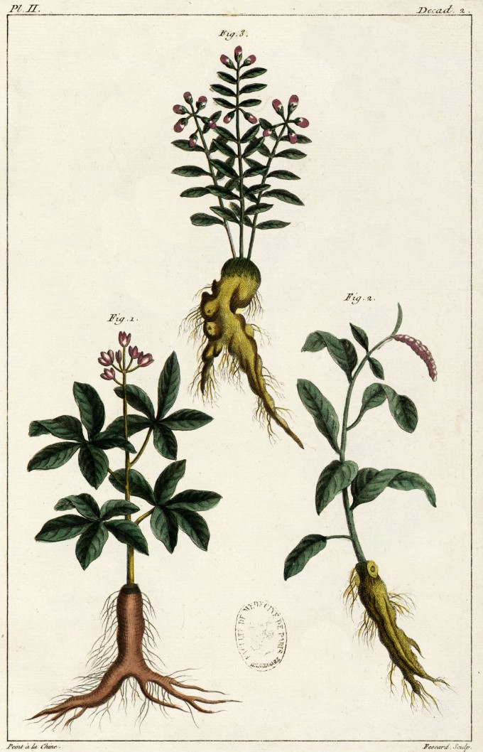 L'ouvrage de matières médicales bencao pinhui jingyao (1505) contient 667 dessins de plantes médicinales.